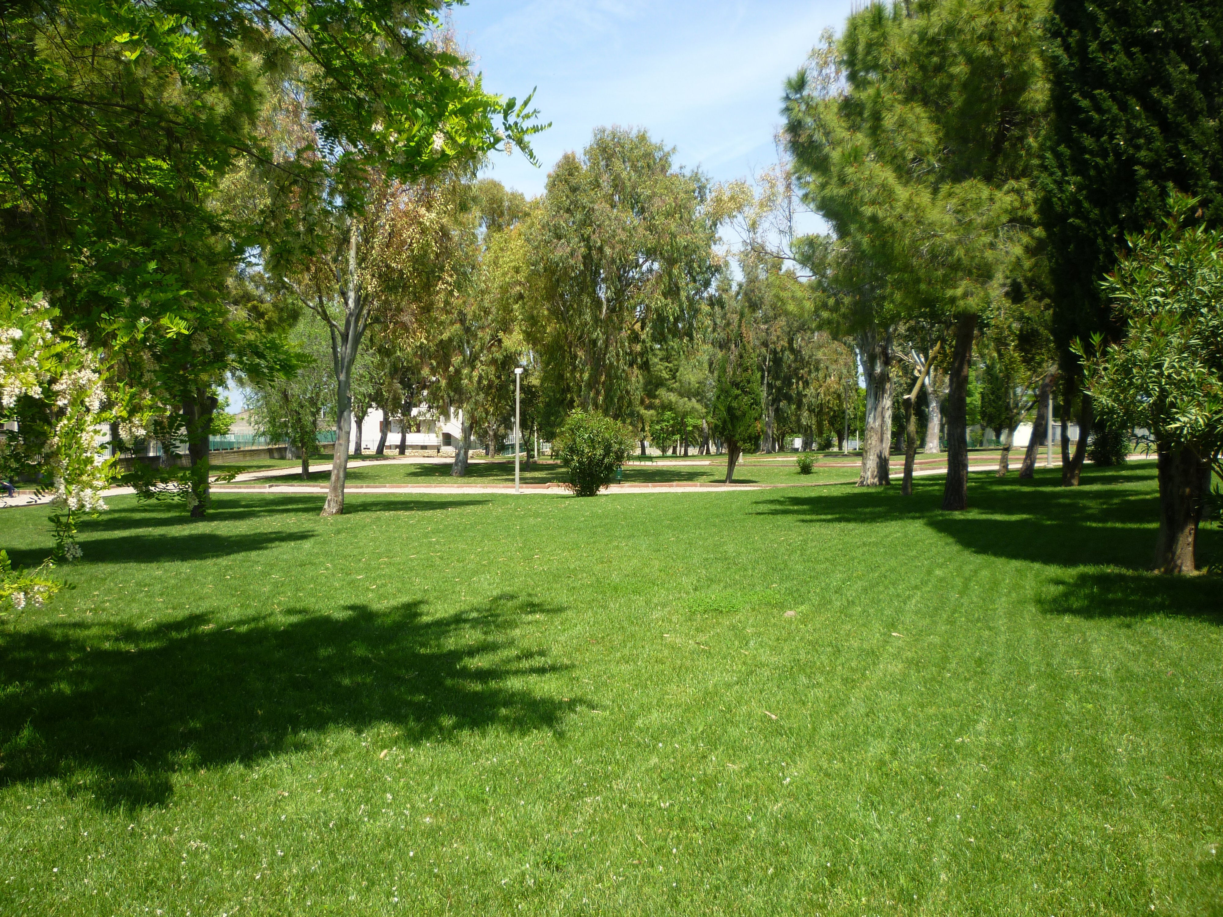 Li Punti (Sassari) - i giardini pubblici.